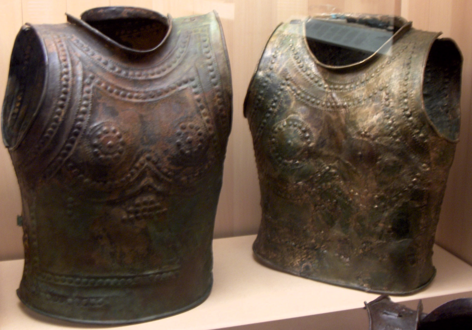 Cuirasse de Marmesse, bronze, âge du bronze, musée des antiquités nationales, Saint-Germain-en-Laye